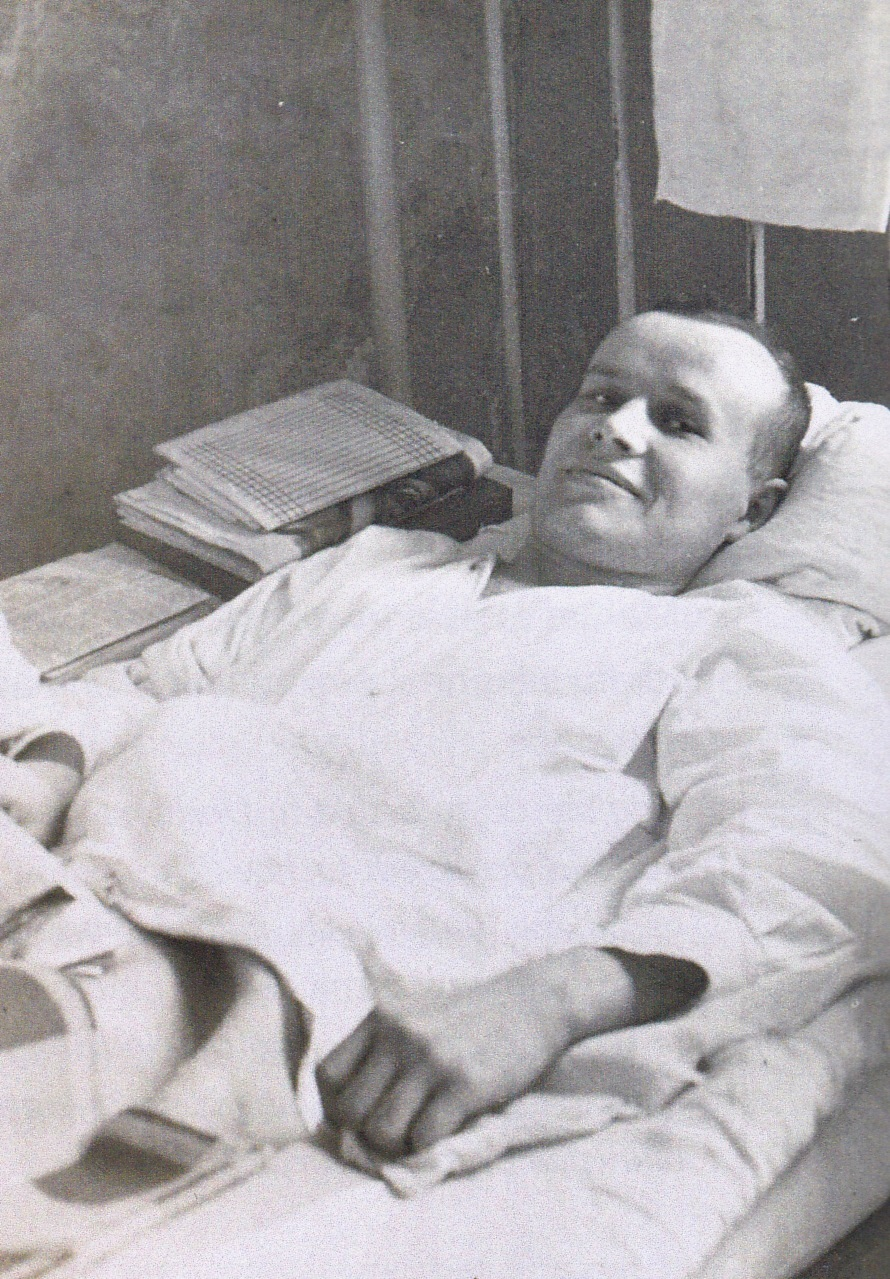 Leon Derlich w klinice w Bratysławie -1930